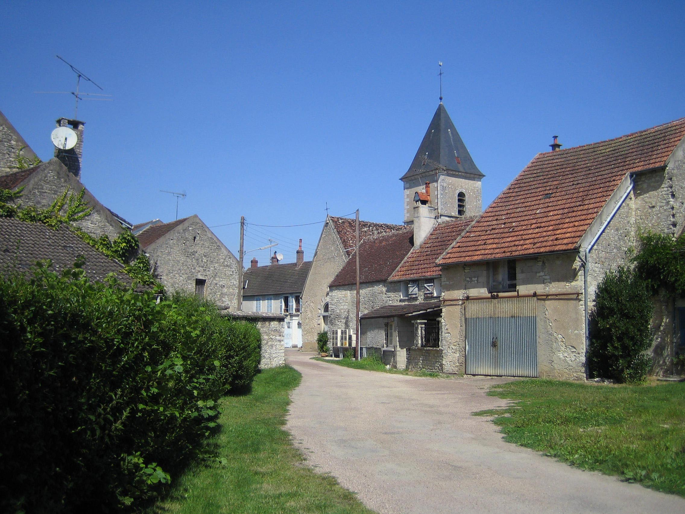 Lucy-sur-Cure (Yonne, Bourgogne, France). Août 2009.